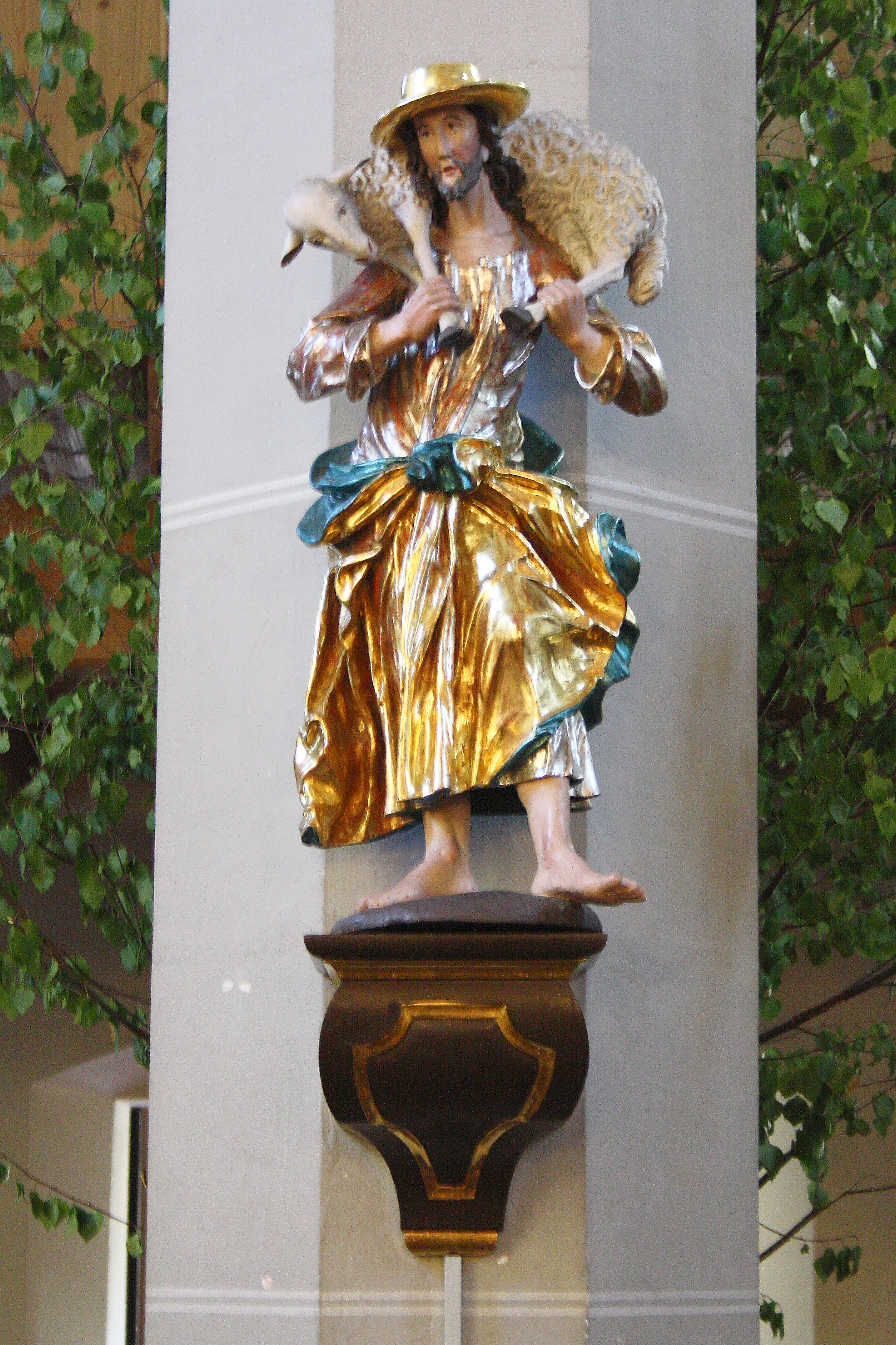 Der Gute Hirte aus der Thomas Schwanthaler-Werkstatt in der Ungenacher Pfarrkirche, Oberösterreich.